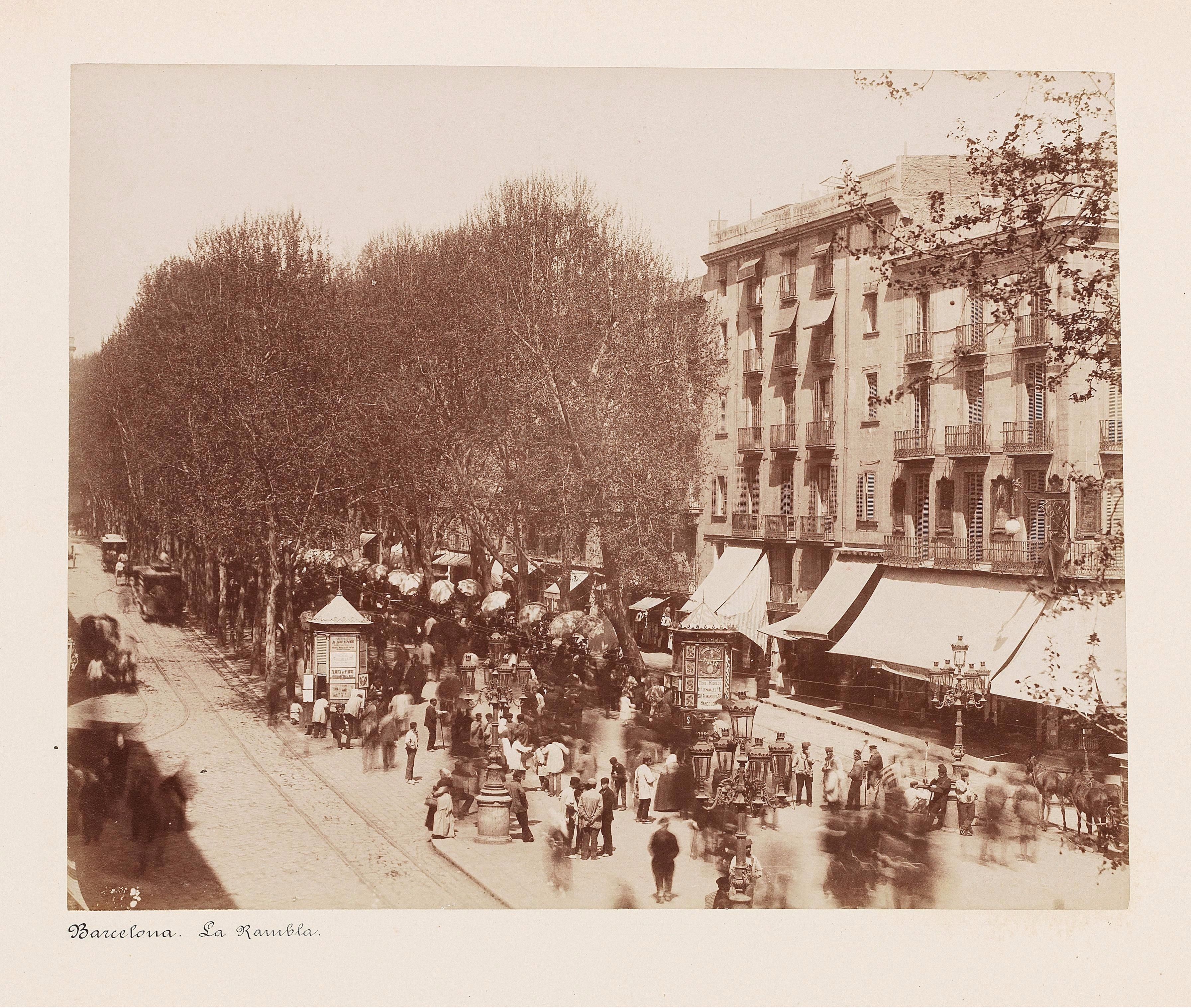 La Rambla